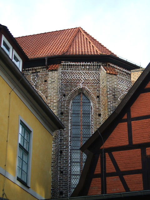 Das Foto zeigt die Katahrinenkirche in Stralsund im März 2007.